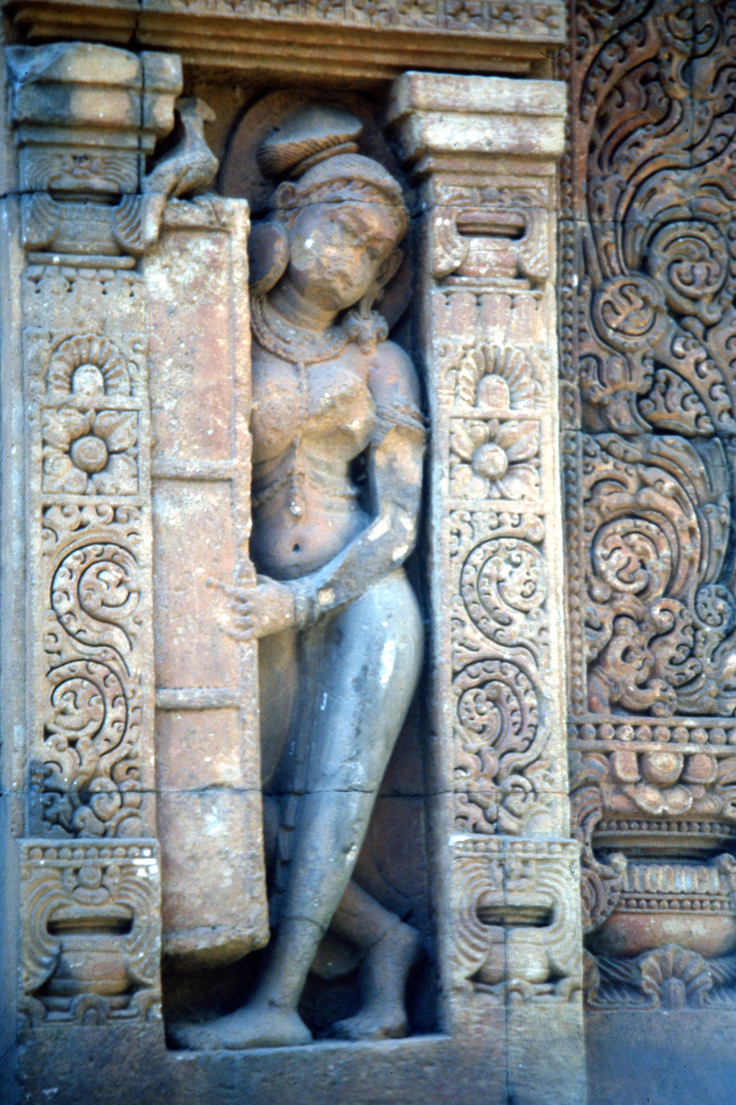 Siglo VIII, Templo Vaital Deul/Baitala Deula, Detalle de la escultura de una apsará que parece estar abriendo una puerta sobre la que descansa un ave, en la parte lateral del nicho pueden observarse también decoraciones de girnaldas y el símbolo de una Purna-Kalasa. Bhuvanesvar, Orissa, India.